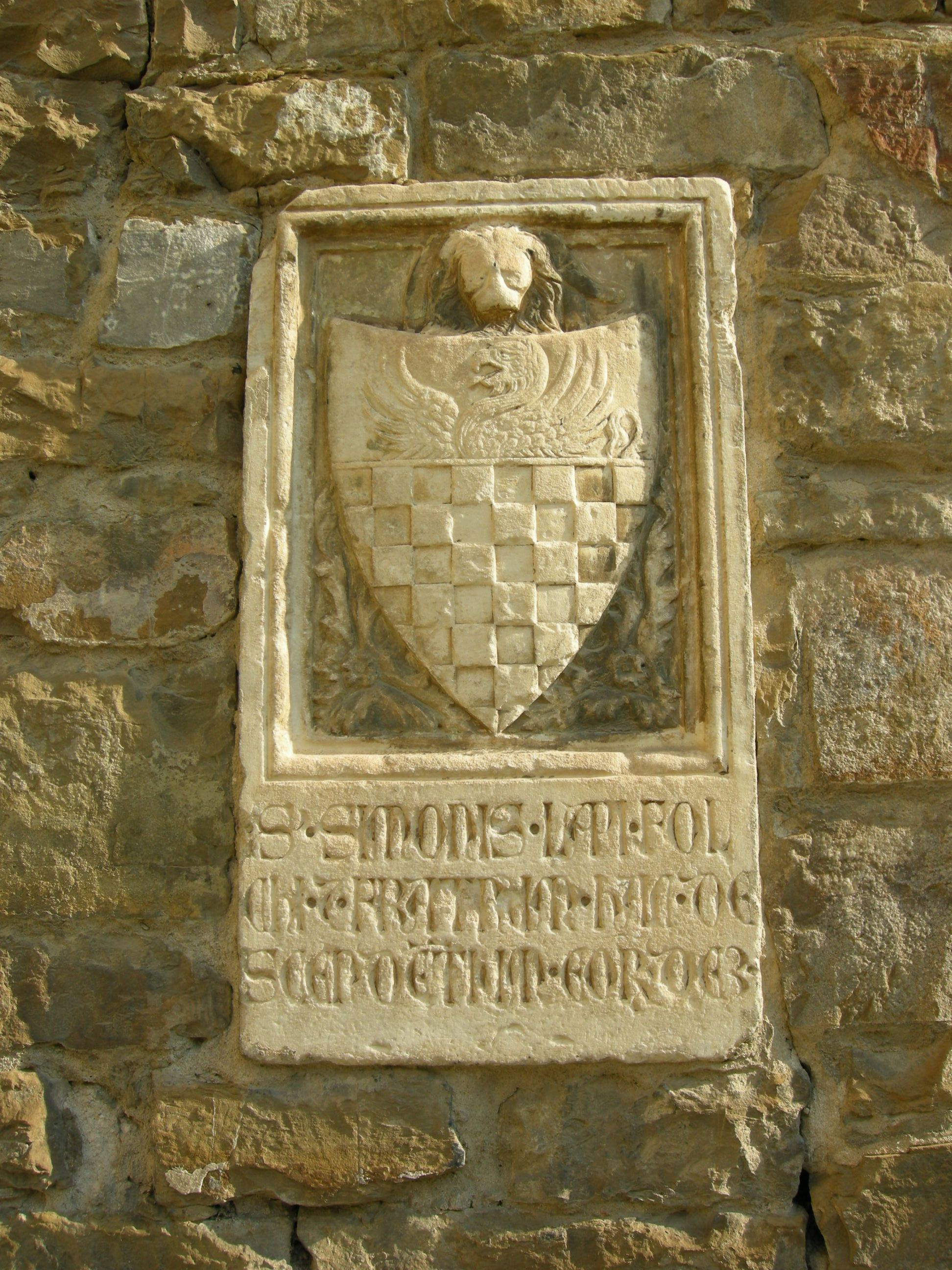 Cenacolo di santo spirito, stemma folchi